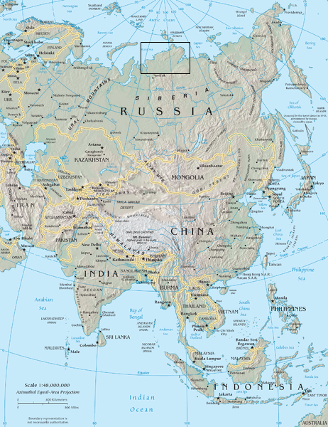 Localizarea peninsulei Taimîr în Asia